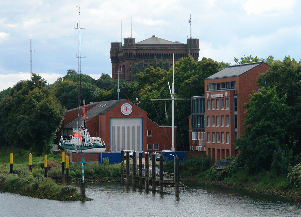 Blick von der Wilhelm-Kaisen-Brücke auf den Standort der Deutschen Gesellschaft zur Rettung Schiffbrüchiger (DGzRS) in Bremen, Werderstraße 2. Im Hintergrund das alte Wasserwerk, die „umgedrehte Kommode“.